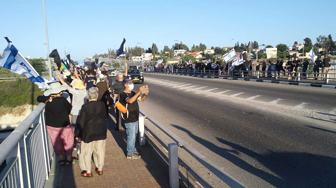 גל המחאות נגד נתניהו, 2020. בנוף להפגנות הרחוב התייקמה "מחאת הגשרים" ב-260 גשרים וצמתים בישראל